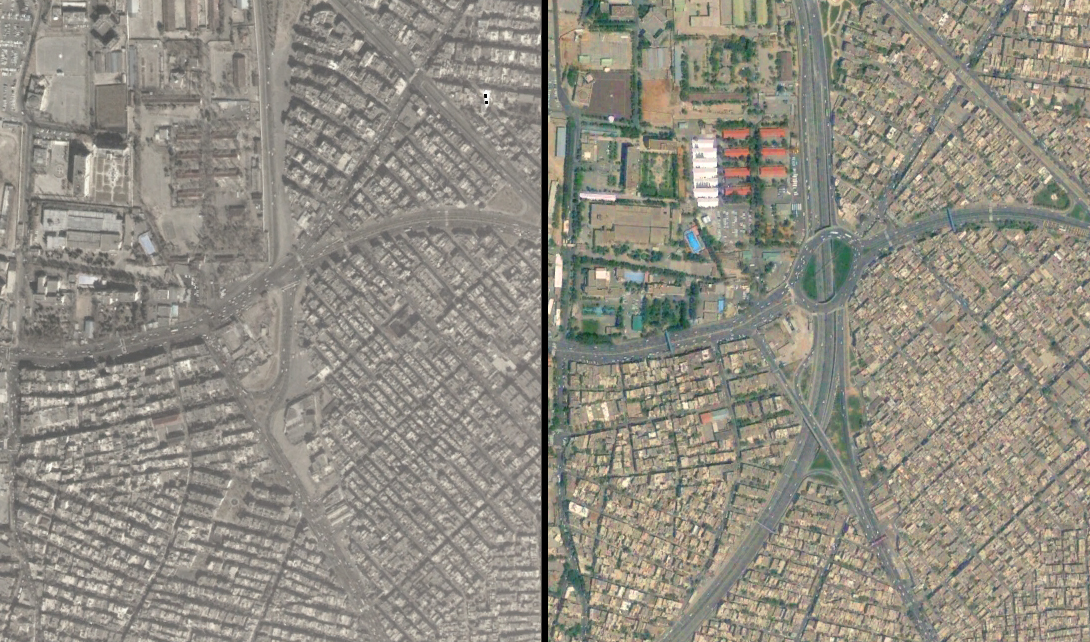 مقايسه‌ى ميدان سبلان در سال‌هاى 80 و 85، قبل و بعد از پروژه‌ى ميدان سبلان